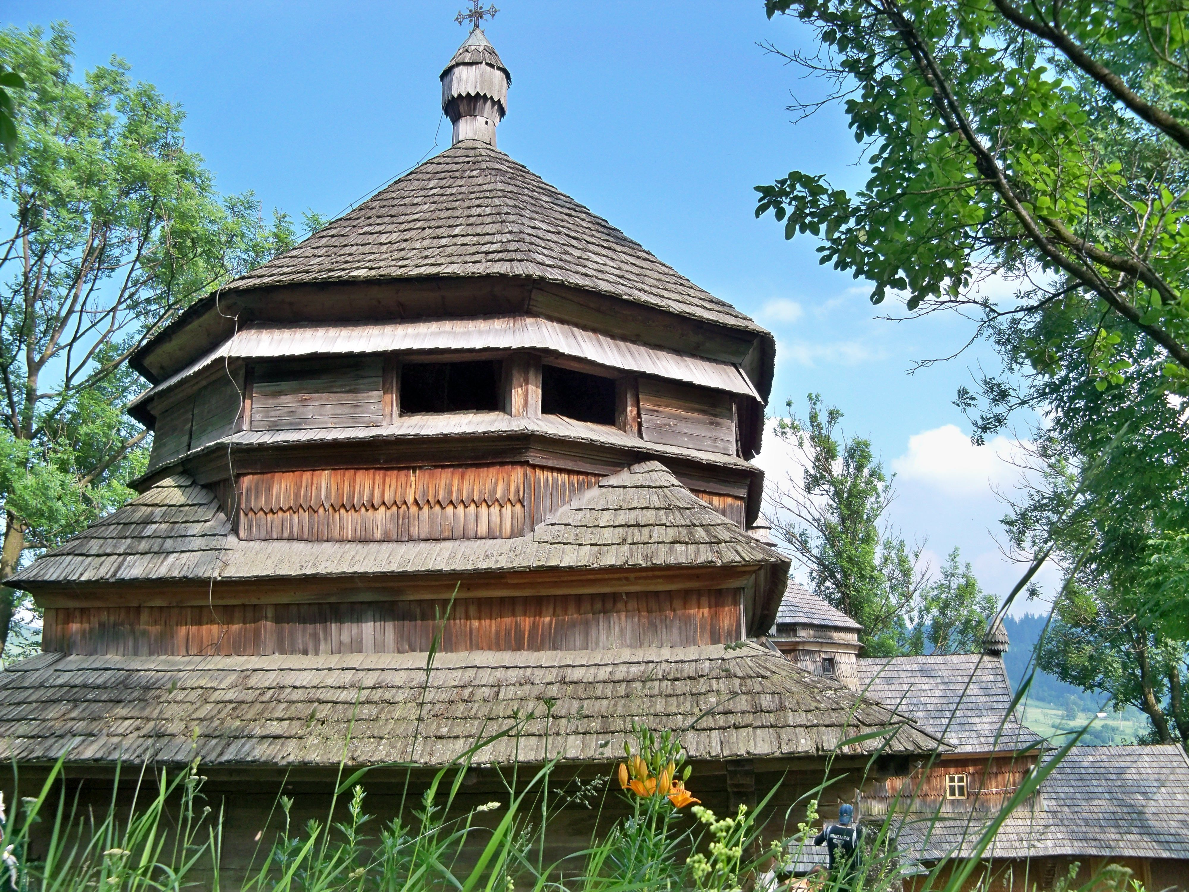 Дзвіниця Вознесенської (Струківської) церкви (дер.), смт. Ясіня